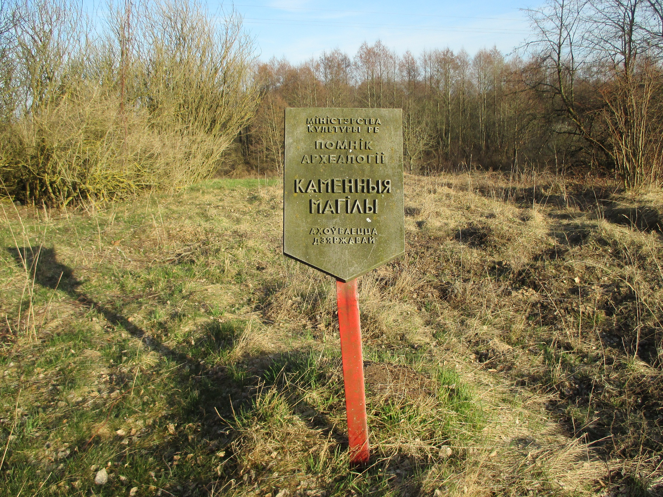 Беліца, Лідскі раён. Каменныя магілы - помнік археалогіі